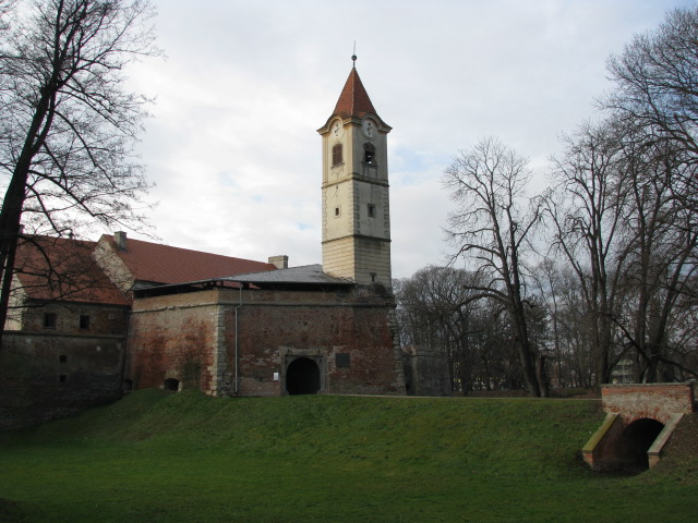 Stari grad Čakovec